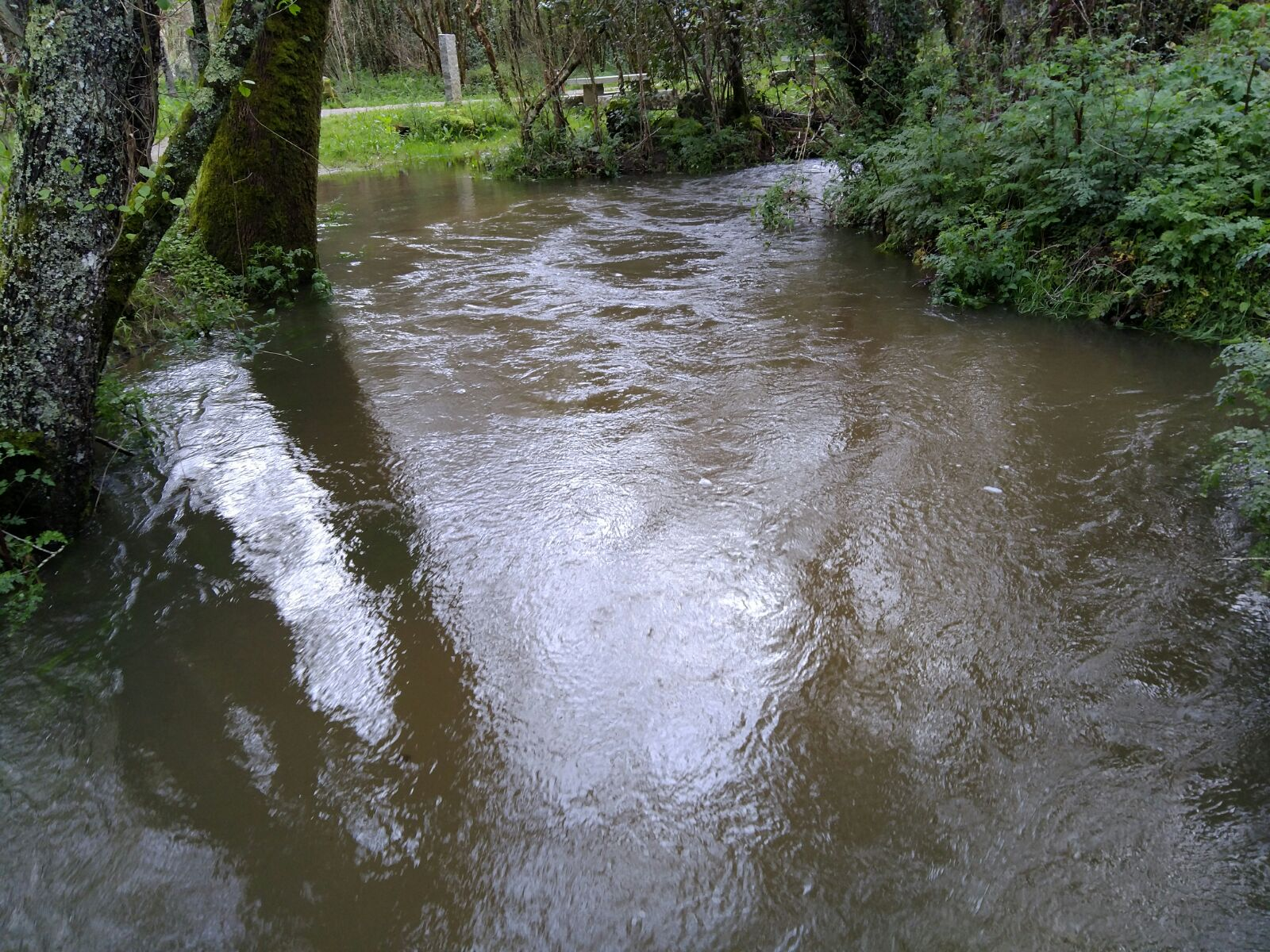 Rio Caselas en la zona de As Regadas